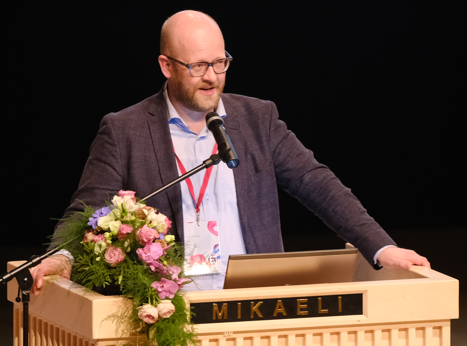 FT, dos., tutkijatohtori Ville Kivimäki, Tampereen yliopisto: Suuret aineistot, sähköisyys ja sosiaalihistorian paluu. Mitä mahdollisuuksia ja haasteita suuret sähköiset aineistot tuovat tutkijalle? Miten arkisto- ja tutkimustyö mahdollisesti muuttuu? Millaista tutkimusta on jatkossa luvassa?